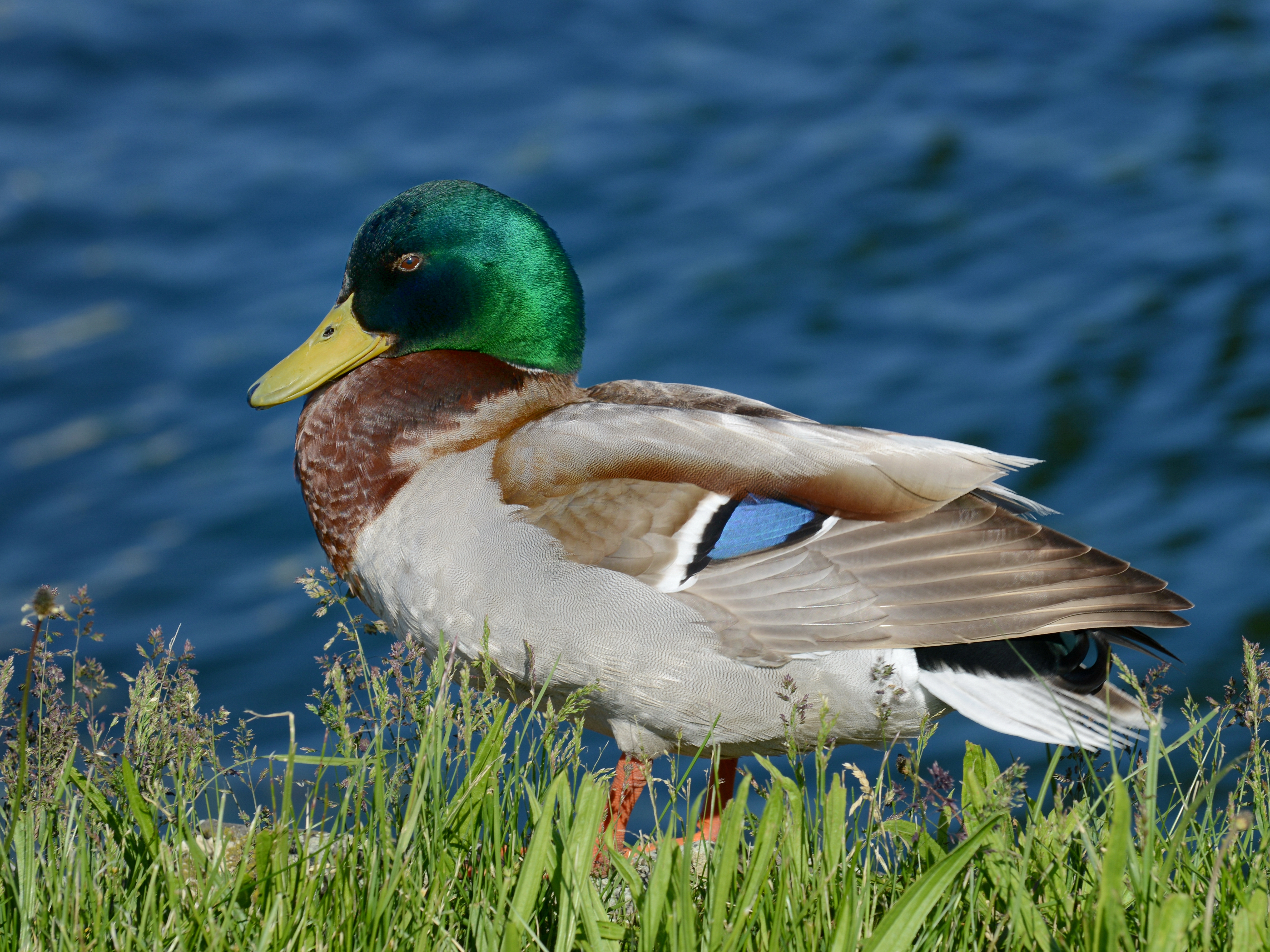 Die Stockente (Anas platyrhynchos) ist die größte und am häufigsten vorkommende Schwimmente Europas und die Stammform der Hausente. Ausgewachsene Männchen sind mit ihrem grünmetallischem Kopf, dem gelben Schnabel und dem weißen Halsring unverwechselbar. Gesehen in Hard.